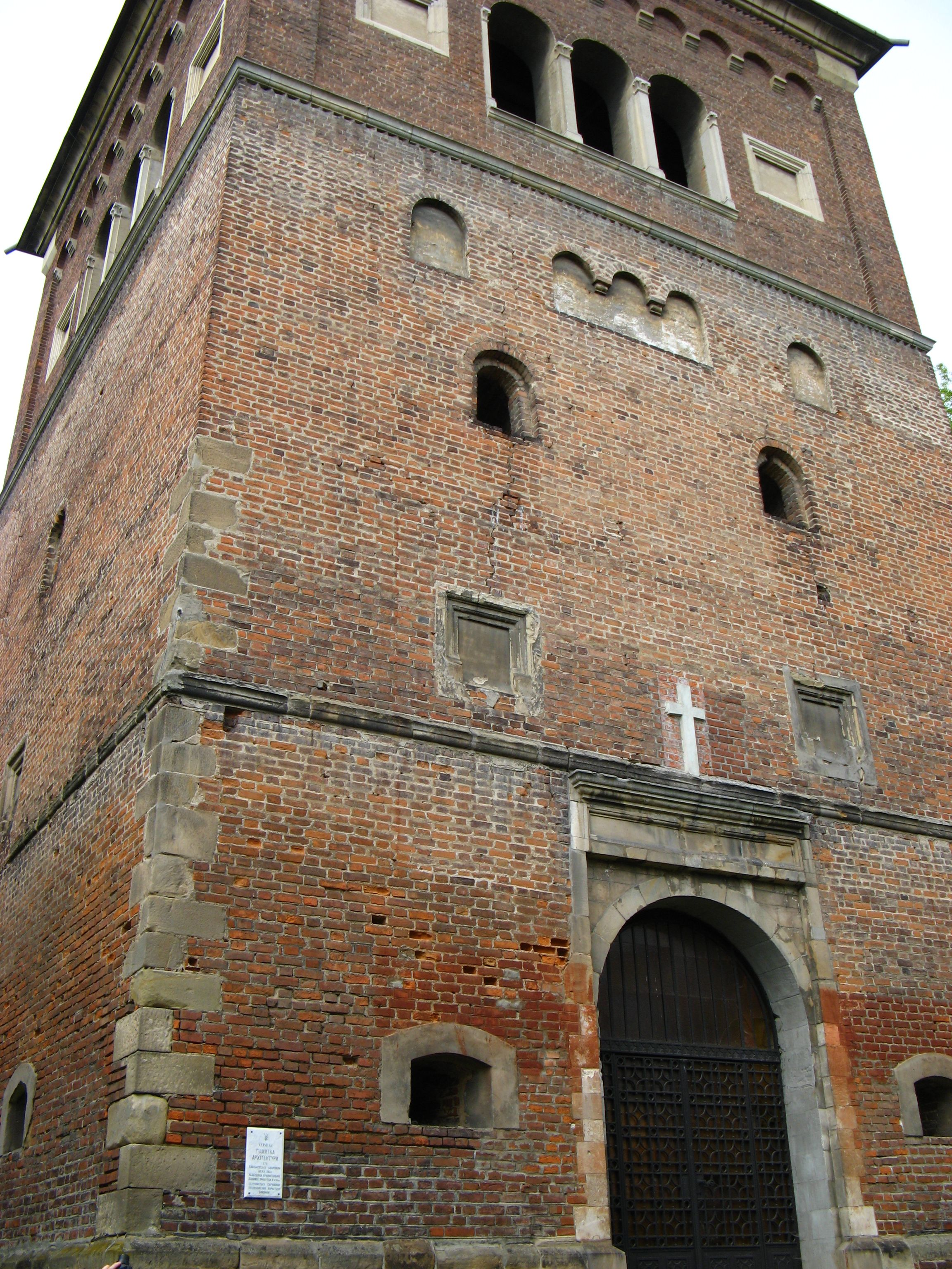 Дзвіниця костелу святого Варфоломія (Дрогобич)